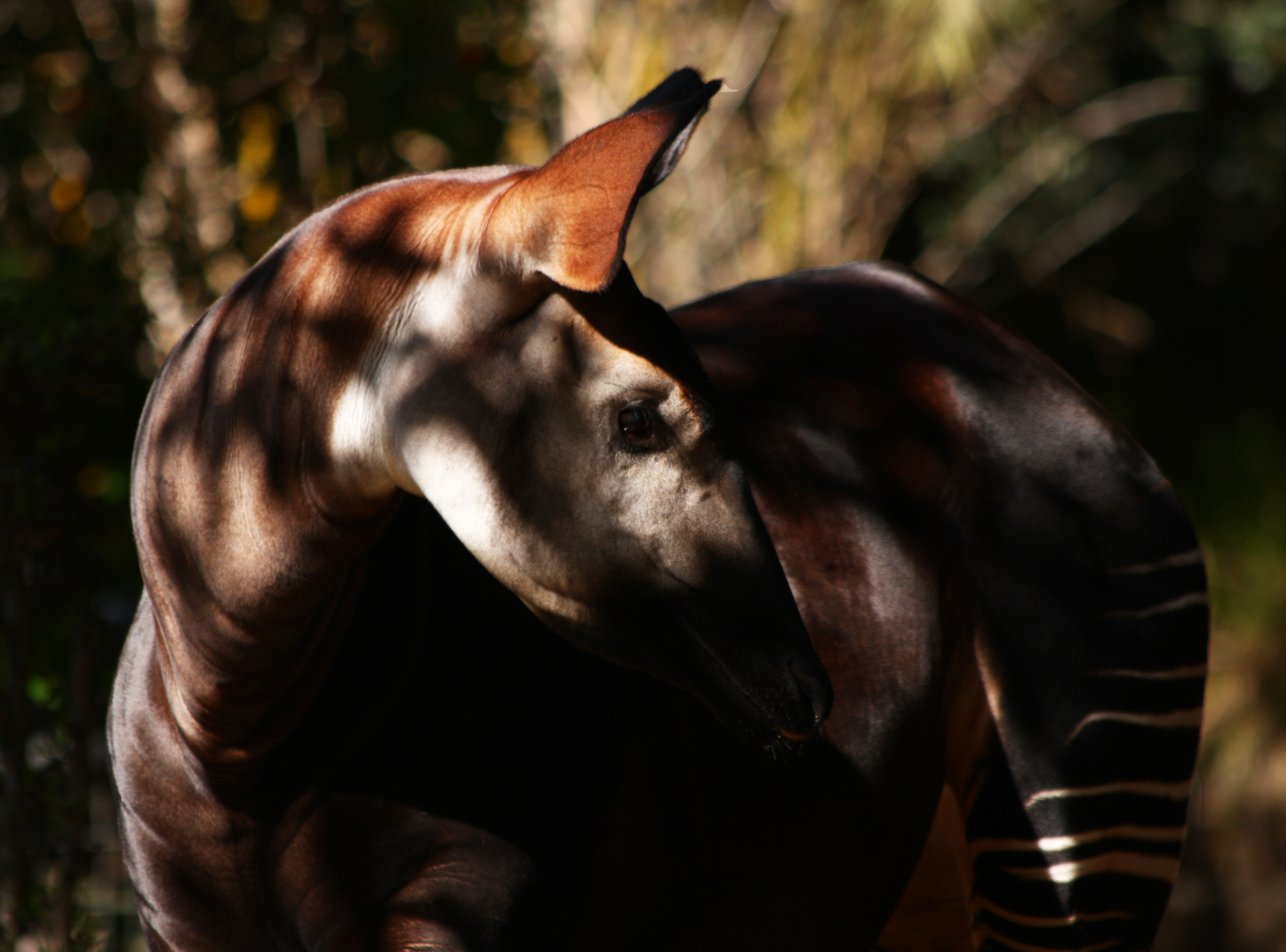 Okapi, San Diego Zoo